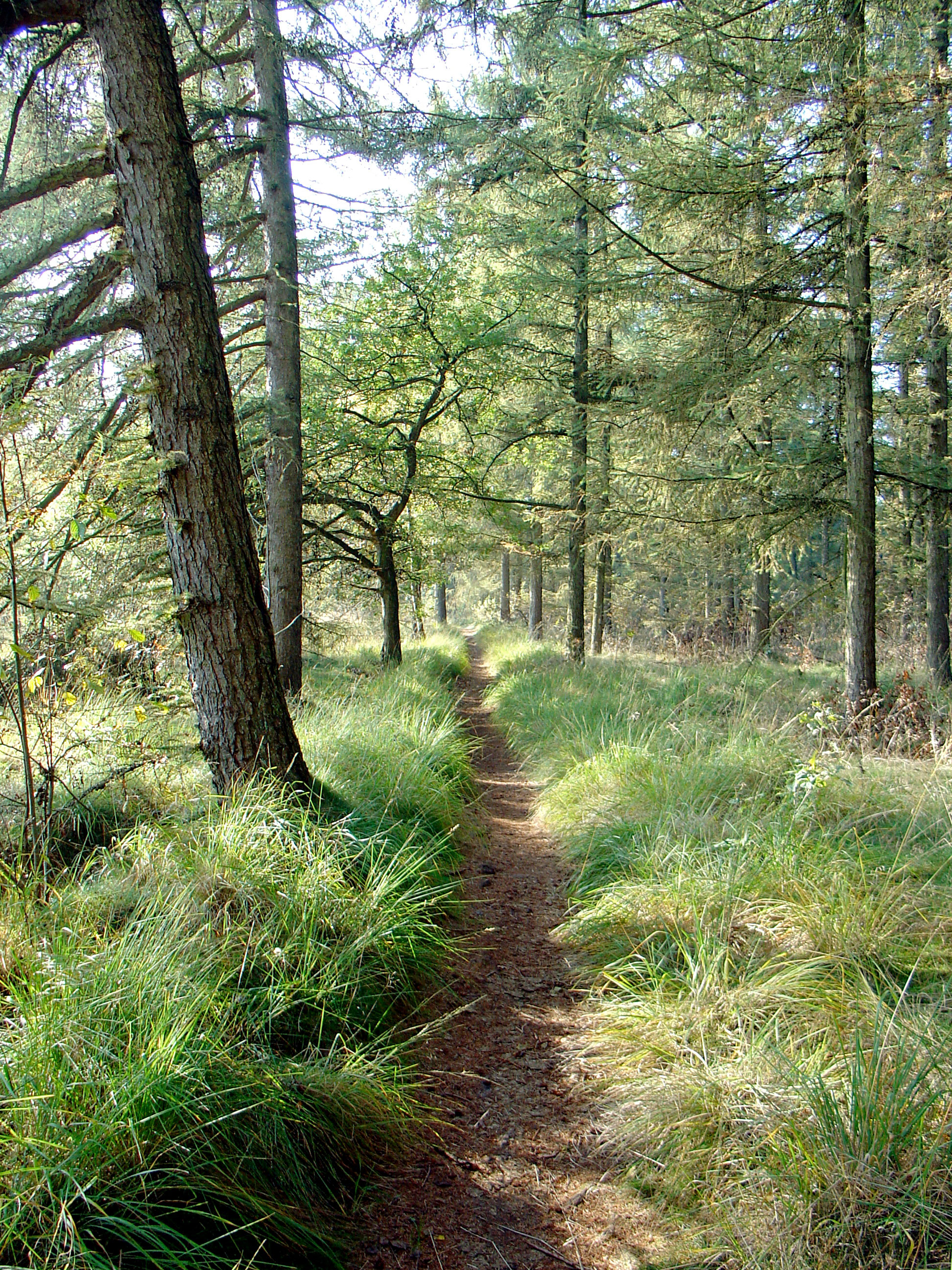 Pad door het Meindersveen nabij Borger